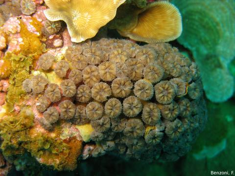 Blastomussa merleti, colonia in situ, Nueva Caledonia